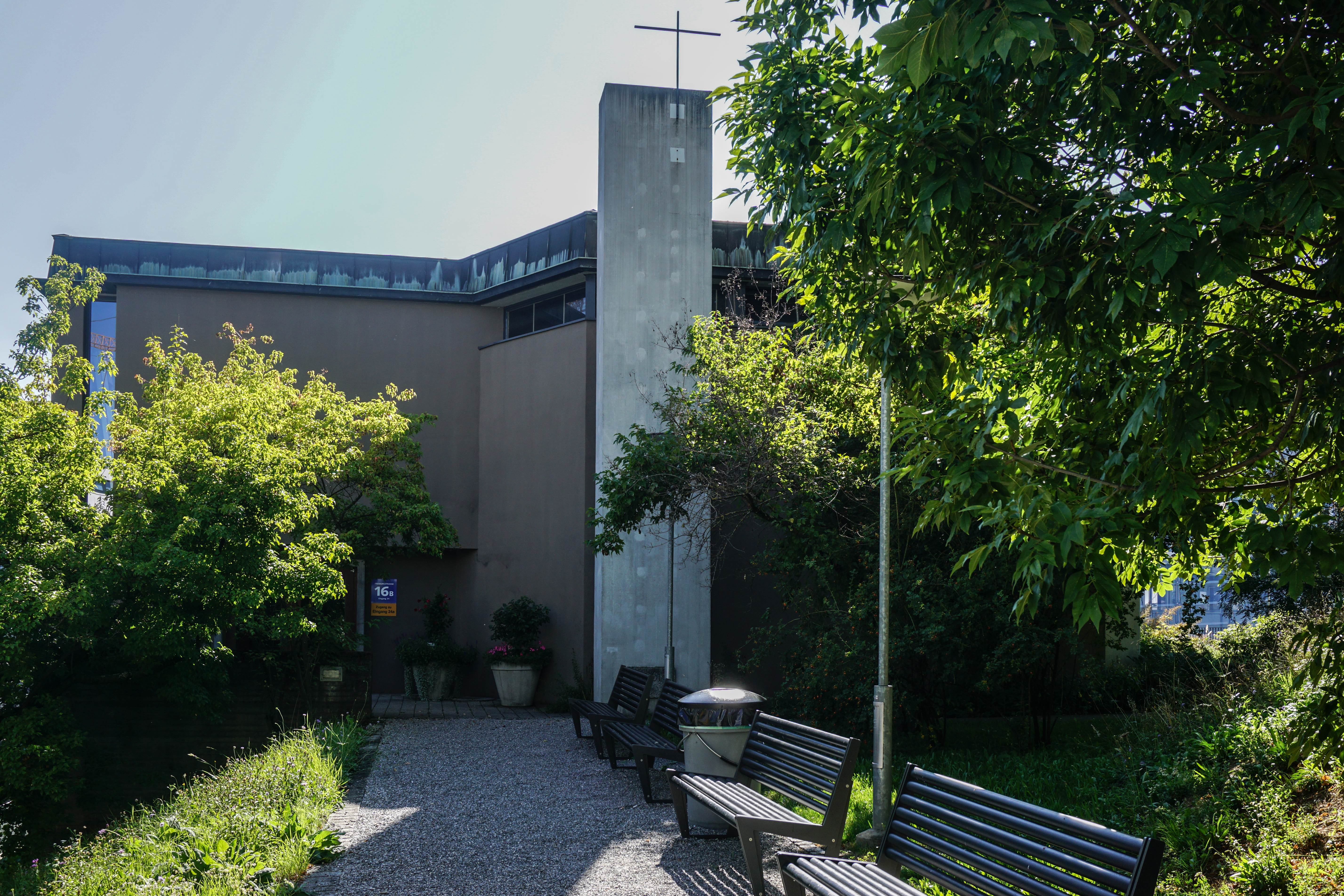 Elisabethenkapelle Seiteneingang mit Glockenträger